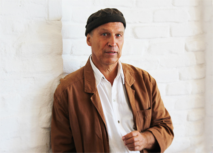 Michael Schwarzmann in der Mensa am Campus I, Johannishof